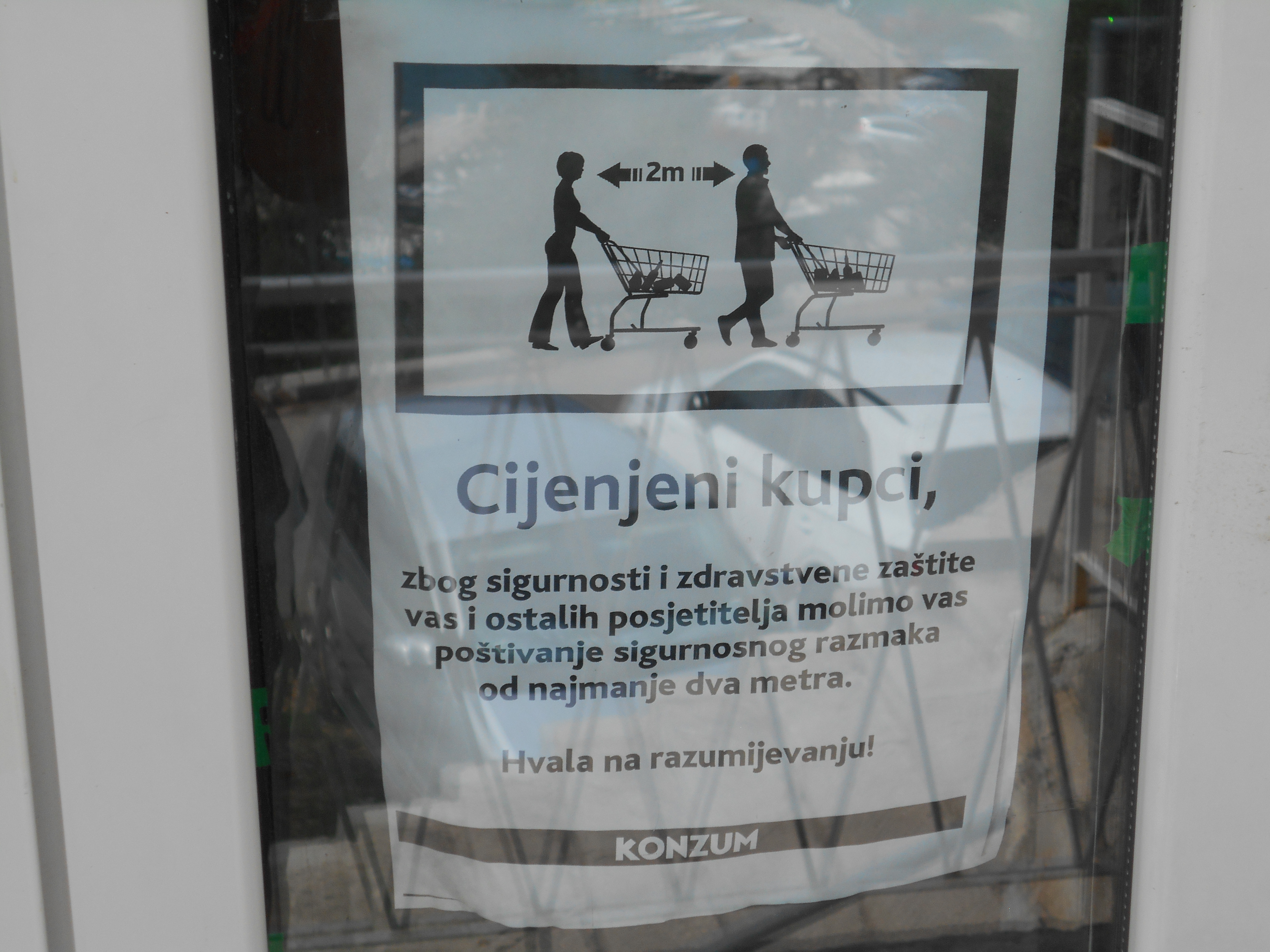 Oznámení o držení dvoumetrových rozestupů v obchodě v Drašnici